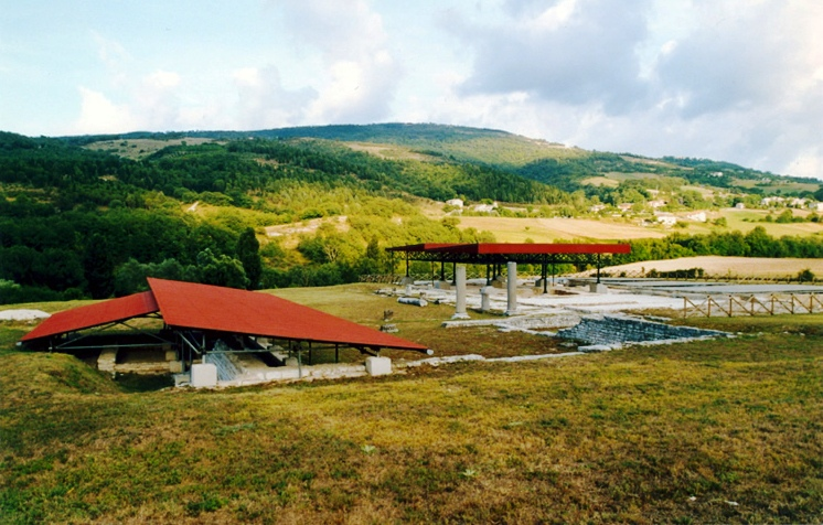 Area archeologica di Sentinum